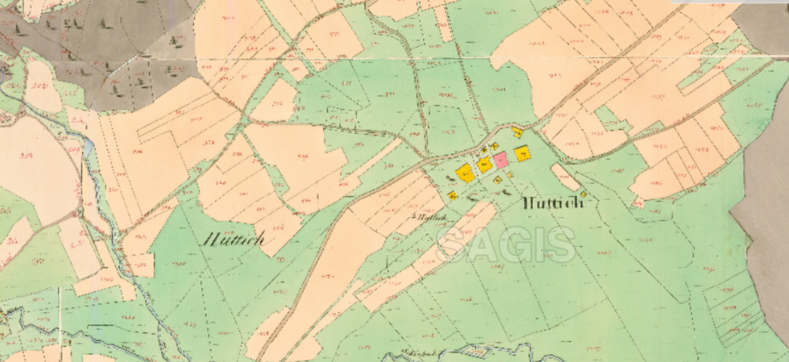 Ortschaft Huttich (Stadtgemeinde Seekirchen am Wallersee) im Fraziszeiischen Kataster (1823-1839)